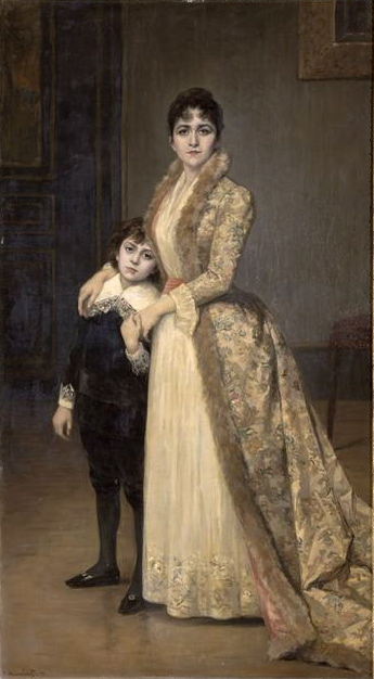 La baronne Gourgaud, née Henriette Chevreau, et son fils, Napoléon Gourgaud (1881-1944), plus tard collectionneur de peintures et dessins